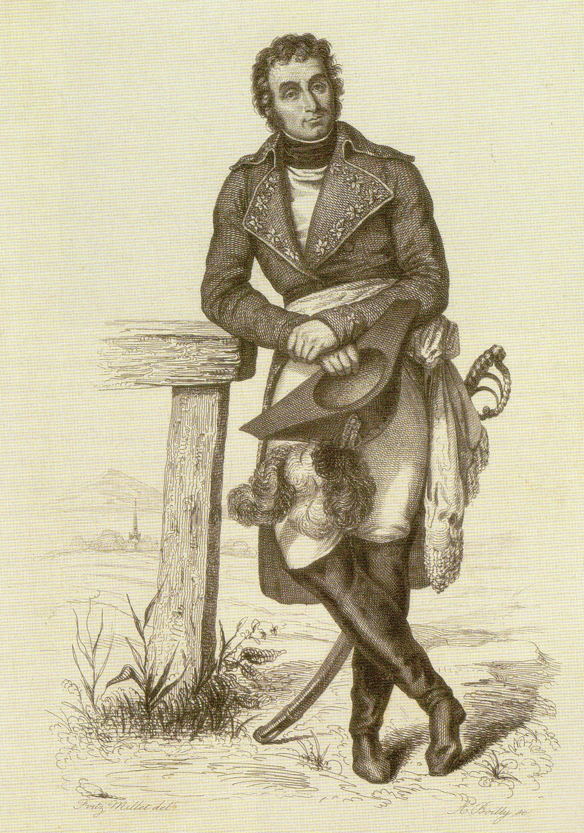 Le général André Masséna. Futur maréchal d'Empire, il deviendra duc de Rivoli et prince d'Essling.